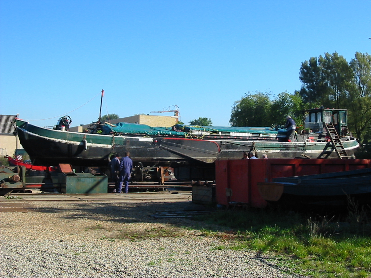 Museumwerf Vreeswijk, 2005-09-19. Zelfgemaakte foto. Museumwerf